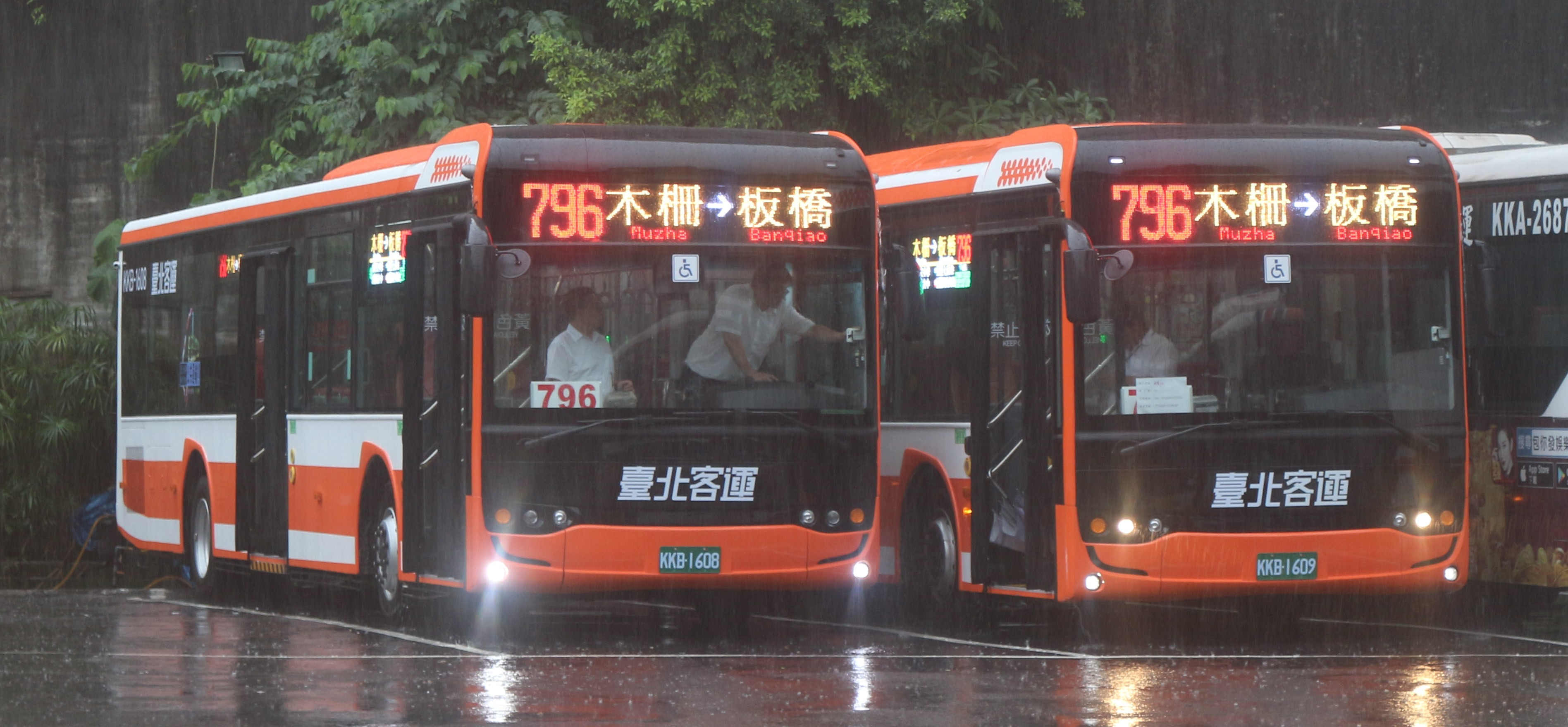 臺北客運2020 YUTONG ZK6128 KKB-1608 KKB-1609 796